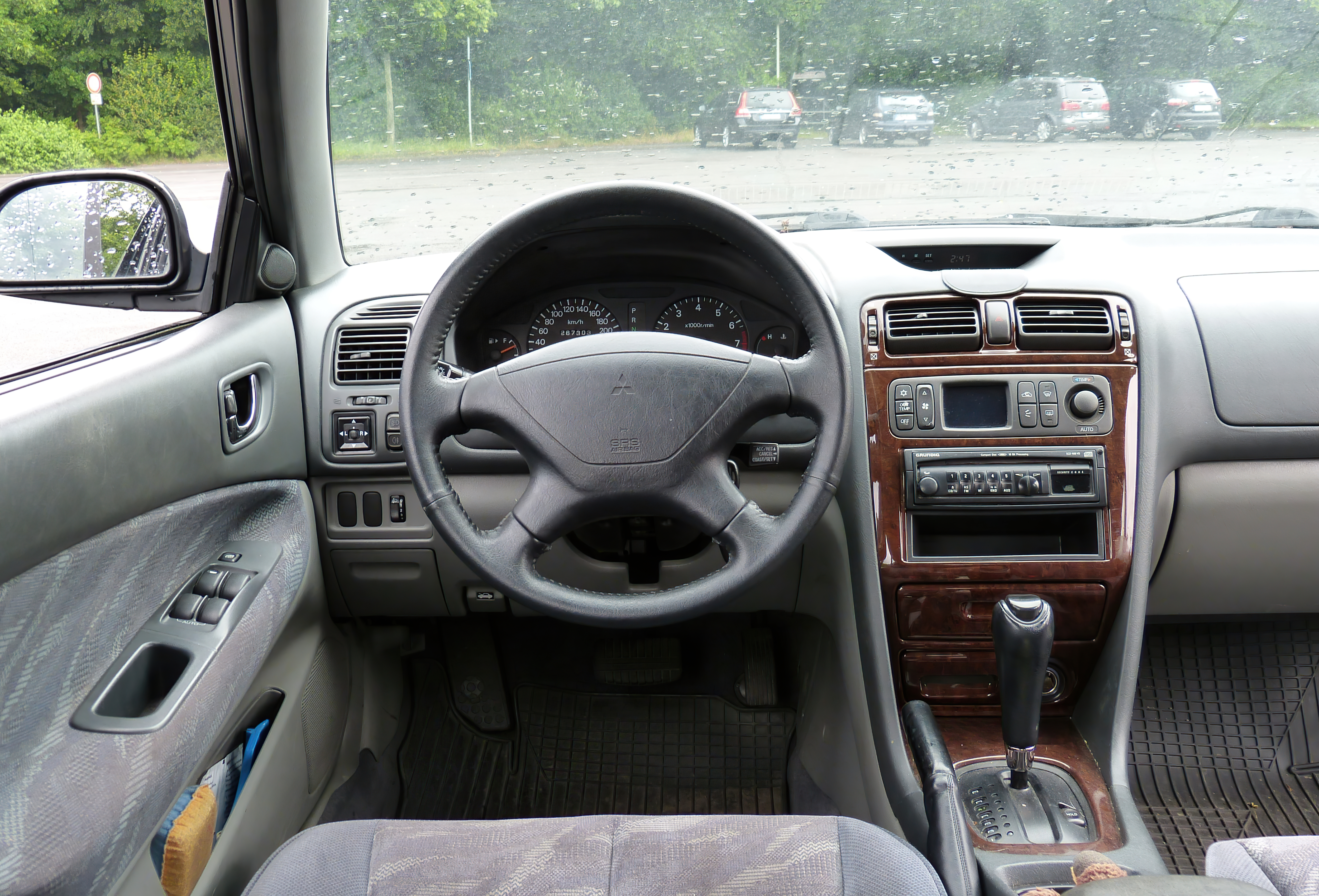 Cockpit eines Mitsubishi Galant EA5A